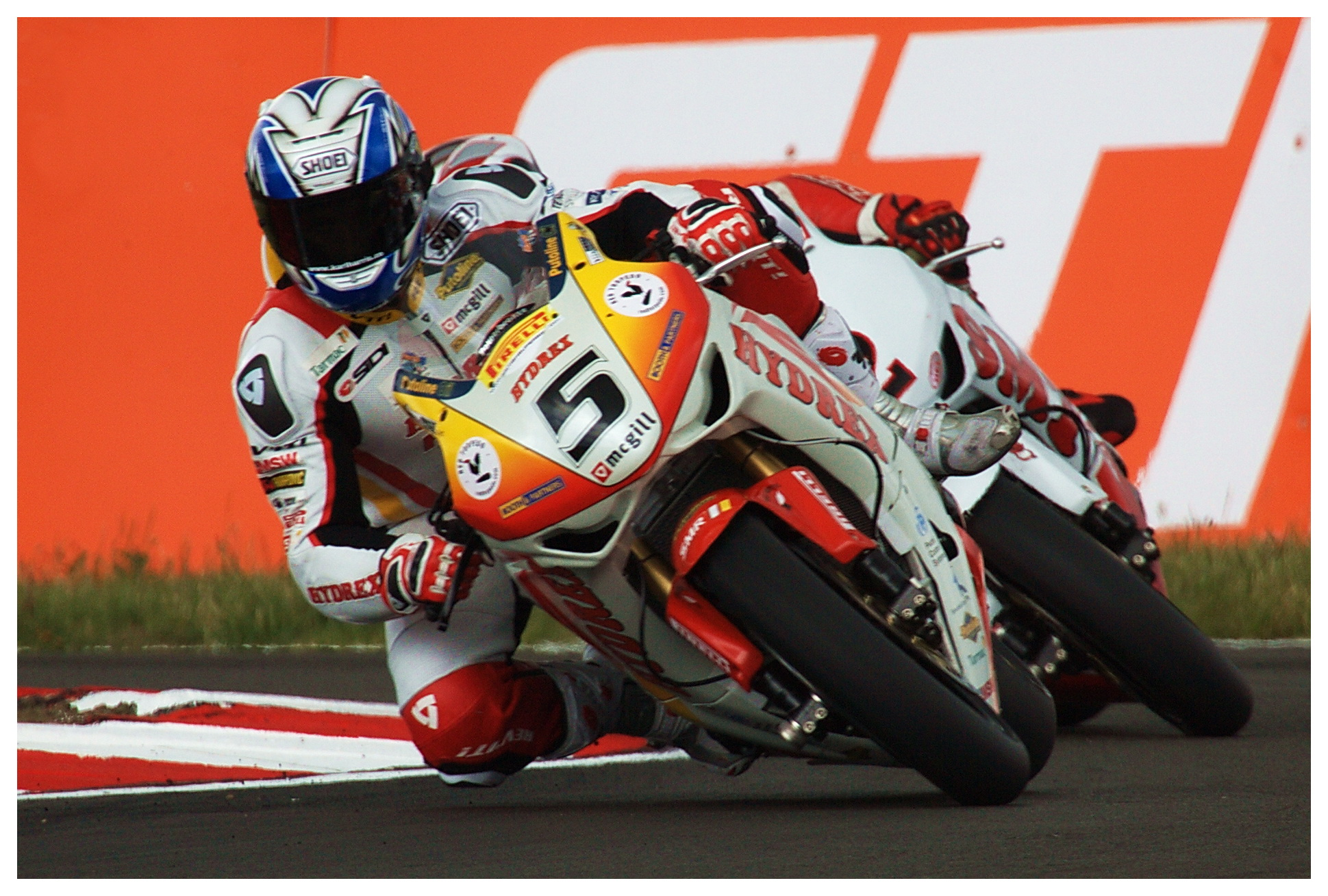 Karl Harris ~ Hydrex Honda (British Superbikes)